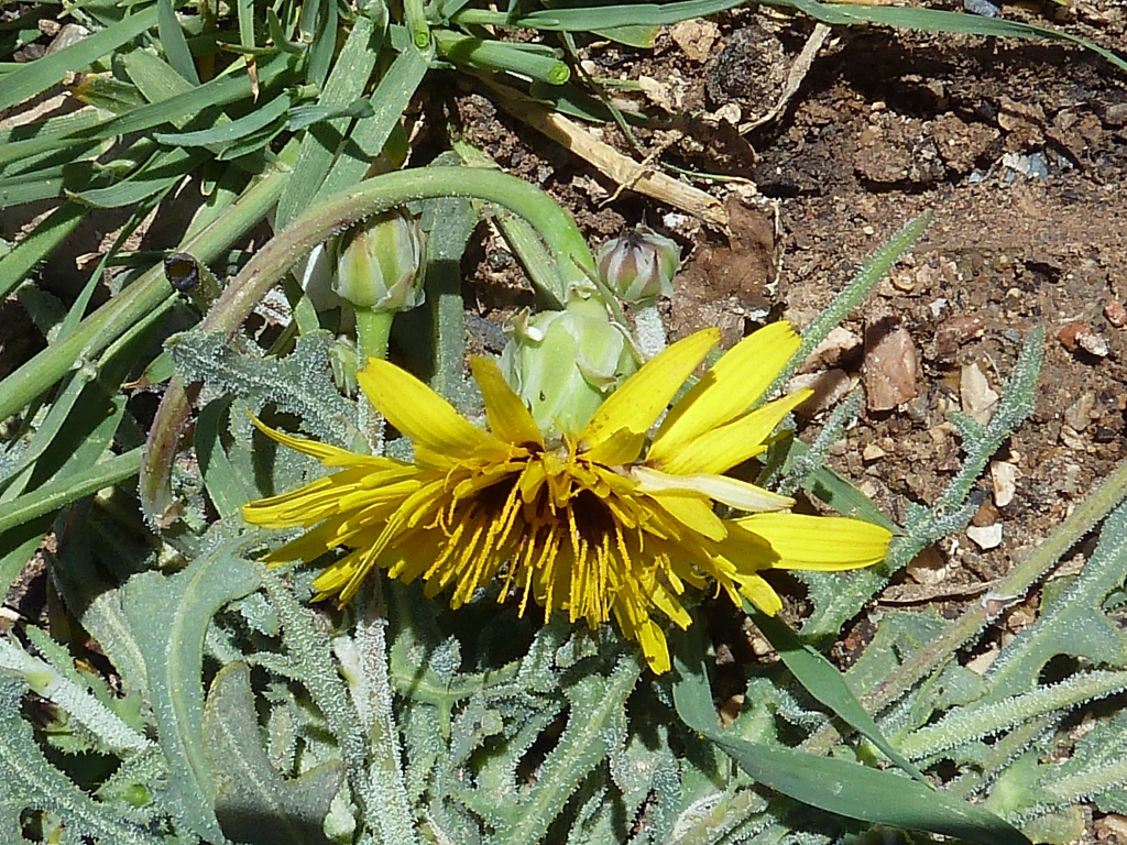 Reichardia tingitana (cosconilla, lechuguilla dulce) - José Cucú - Albatera (Alicante, España).